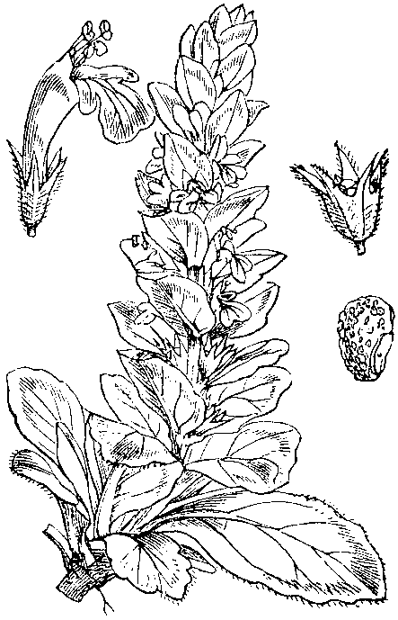 Slika 399. Dlakavi skrečnik. (Ajuga genevénsis.)